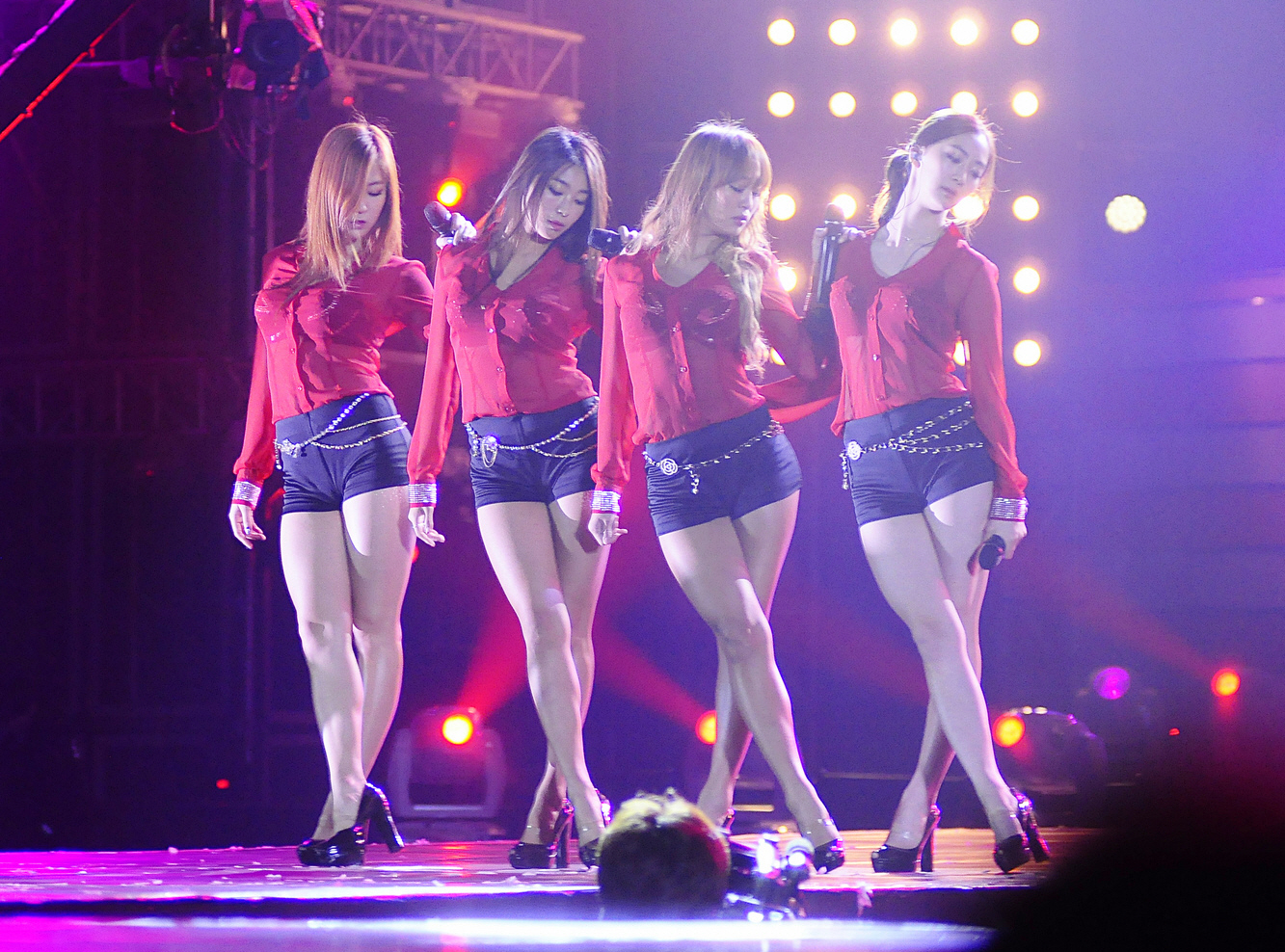 Kpop festival in Vietnam